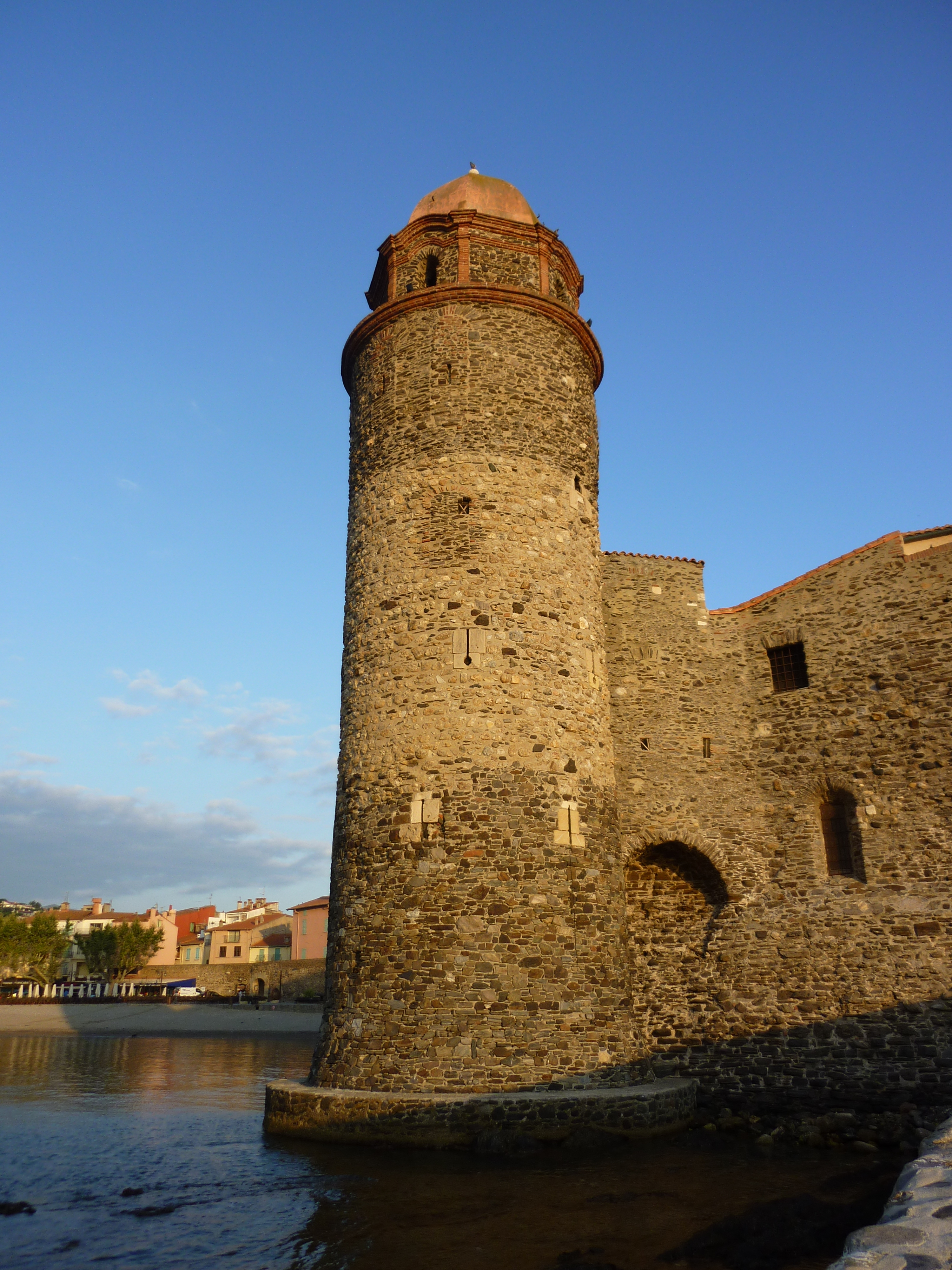 Tour de l'église Notre-Dame-des-Anges de Collioure, (Pyrénées-Orientales, France) .